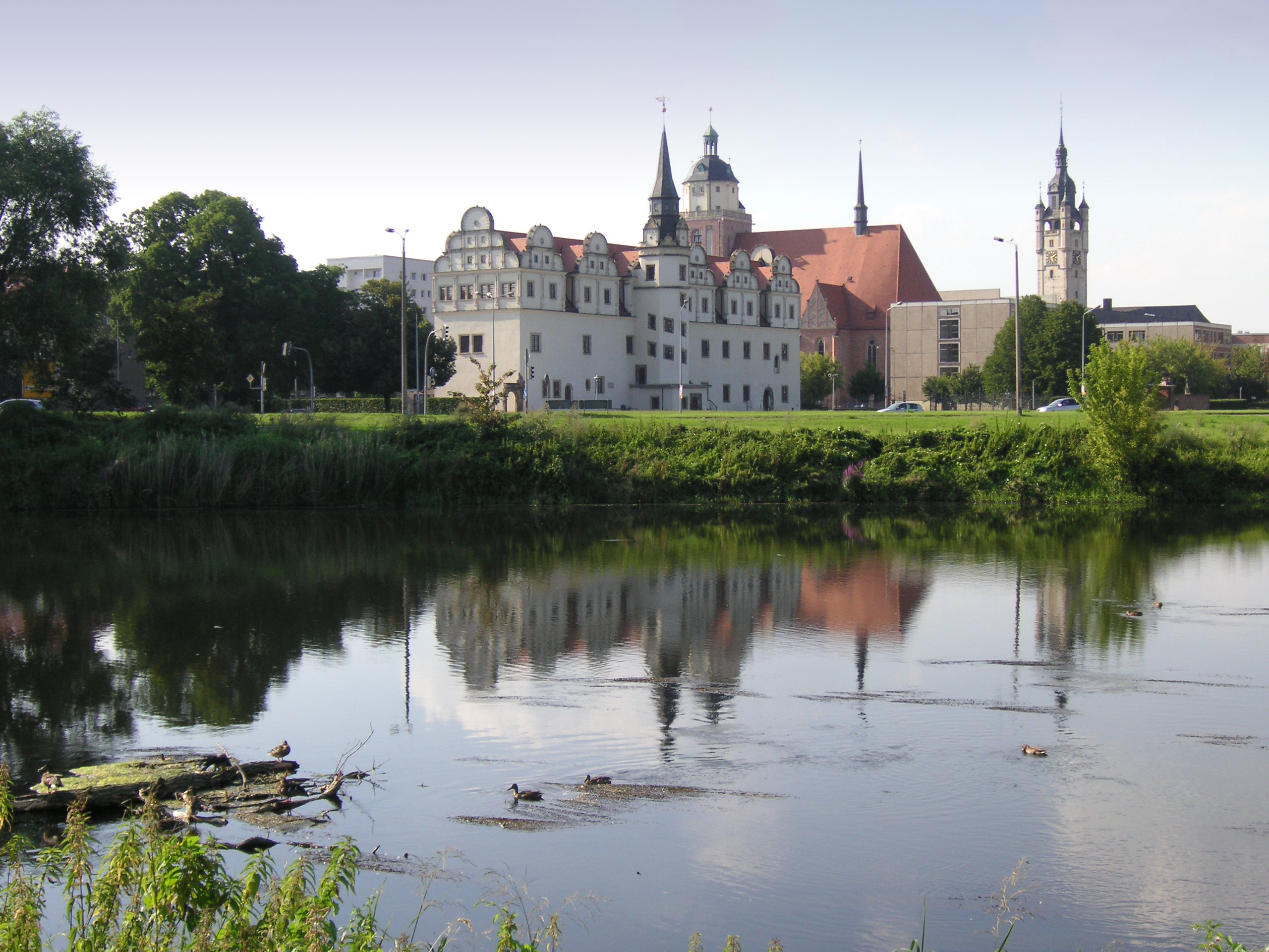 Dessau and Mulde River, Germany